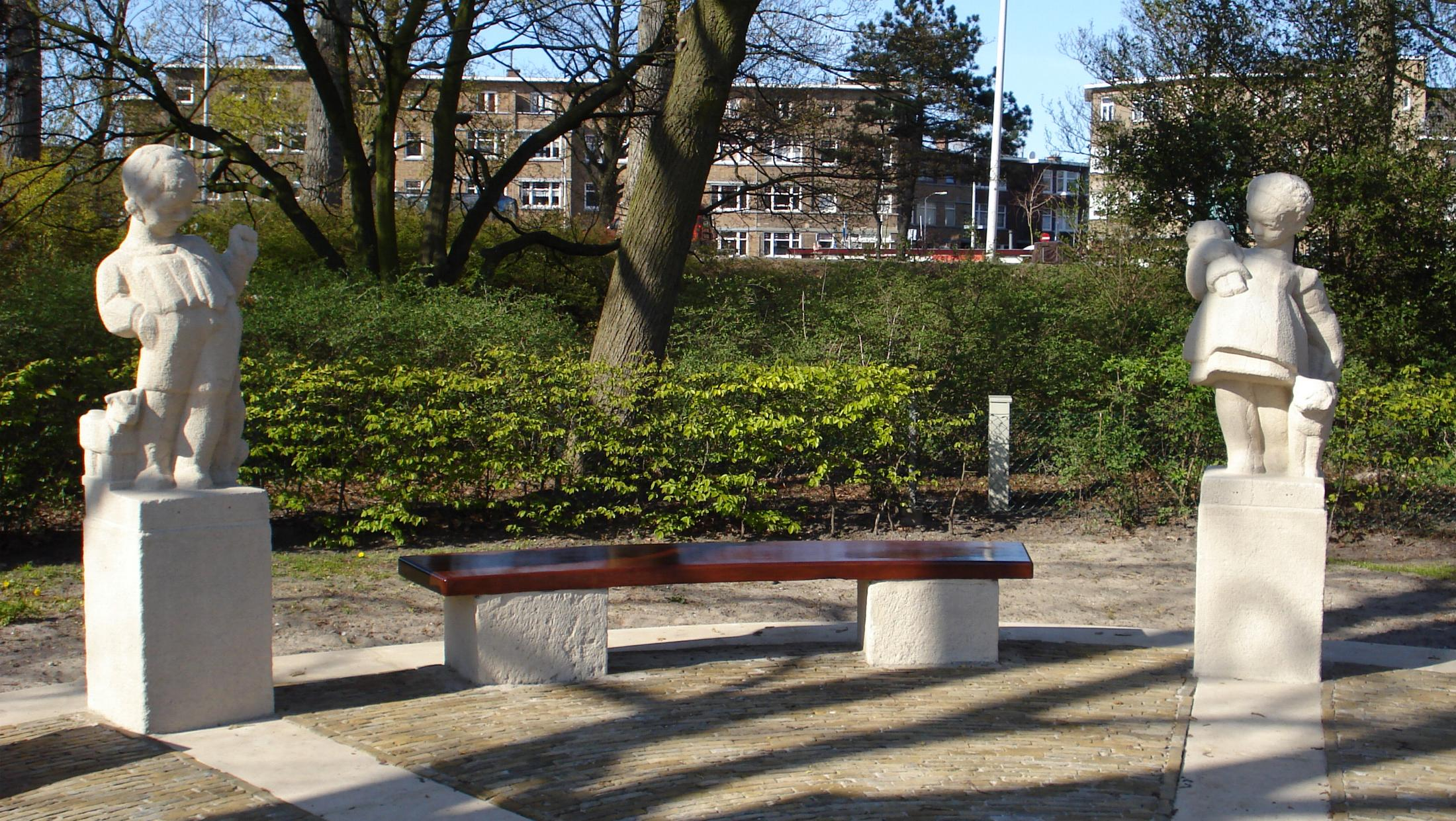 Den Haag, Zuiderpark, Marie Jungiusweg. Kunstwerk "Ot en Sien" van Frits van Hall. The Hague/The Netherlands.